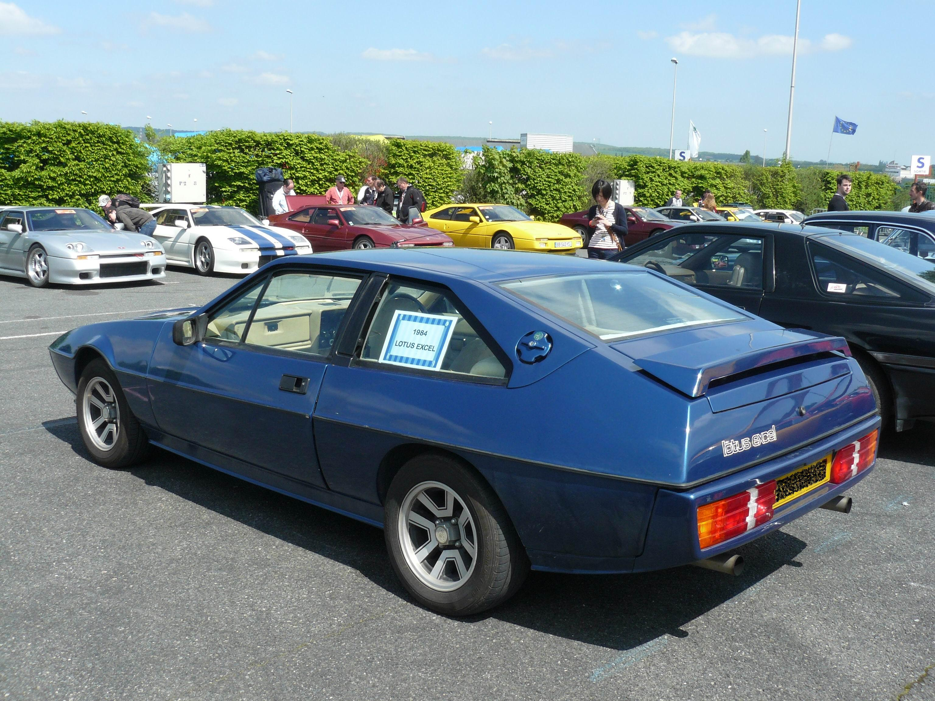 Classic days 2013